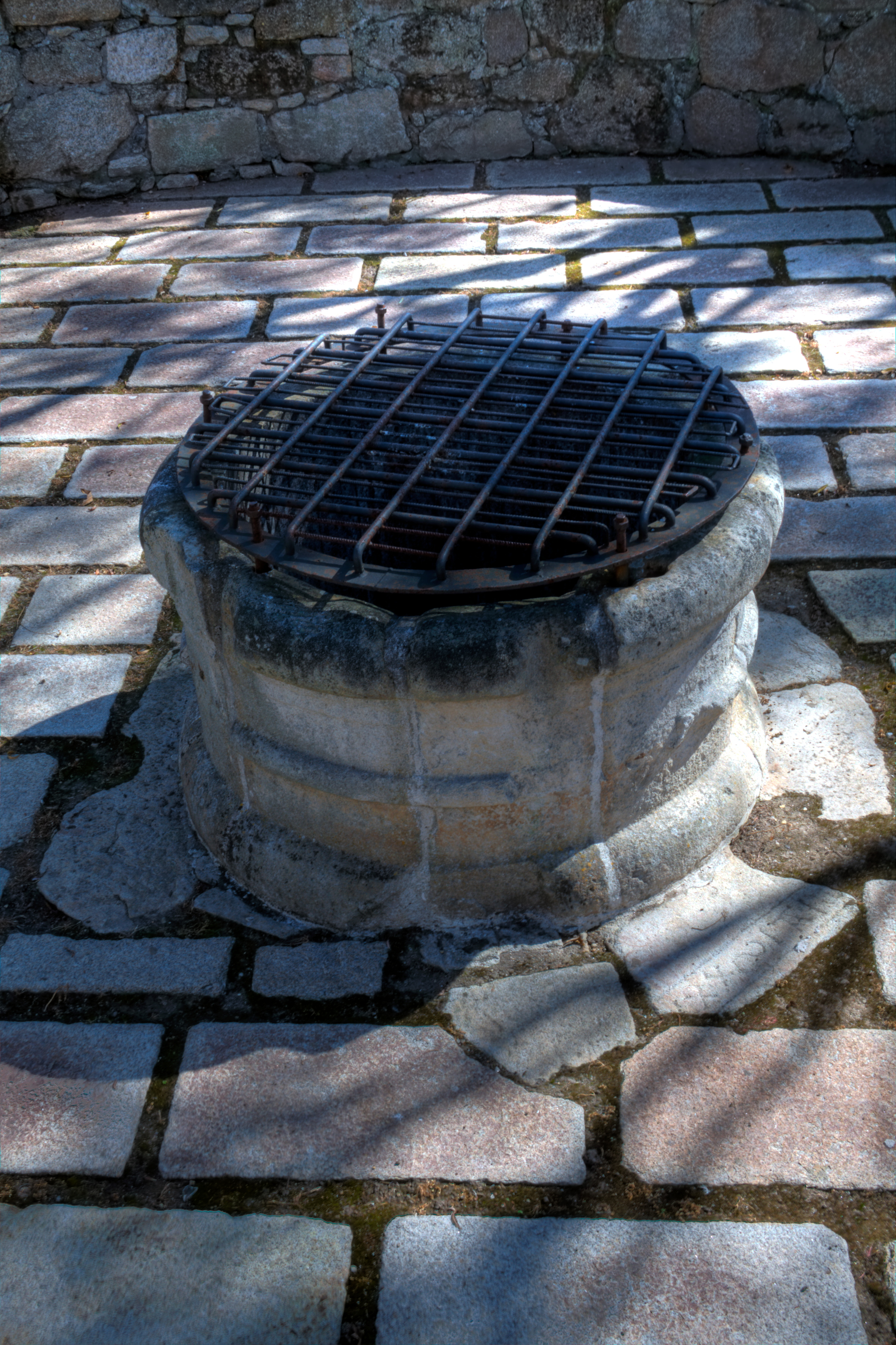 A Coruña - Restos del pozo del Ex-convento de San Francisco